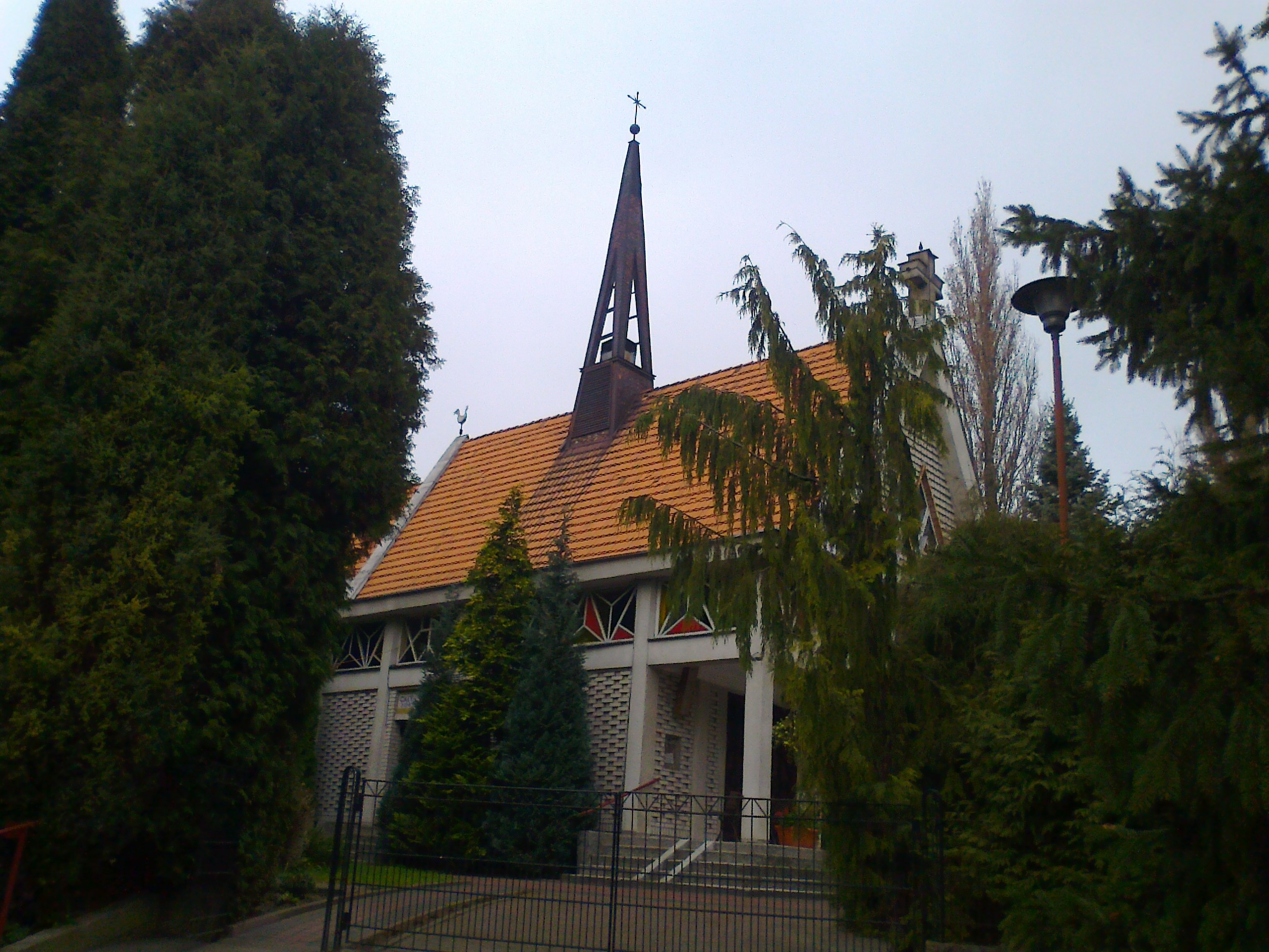 kościół w Smoszewie (woj. mazowieckie, gm. Zakroczym)